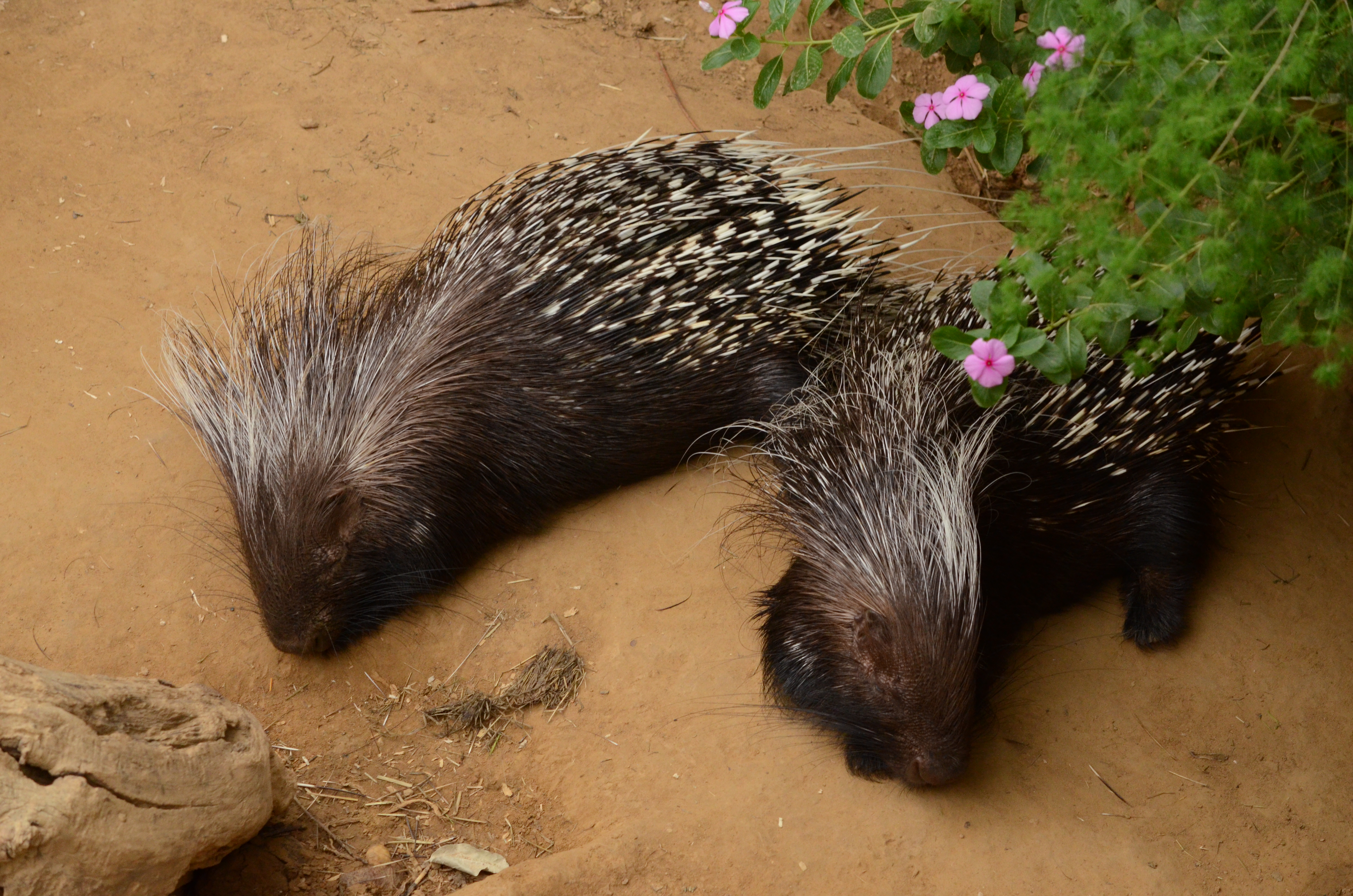 Stekelvarkens in Diergaarde Blijdorp, Rotterdam.